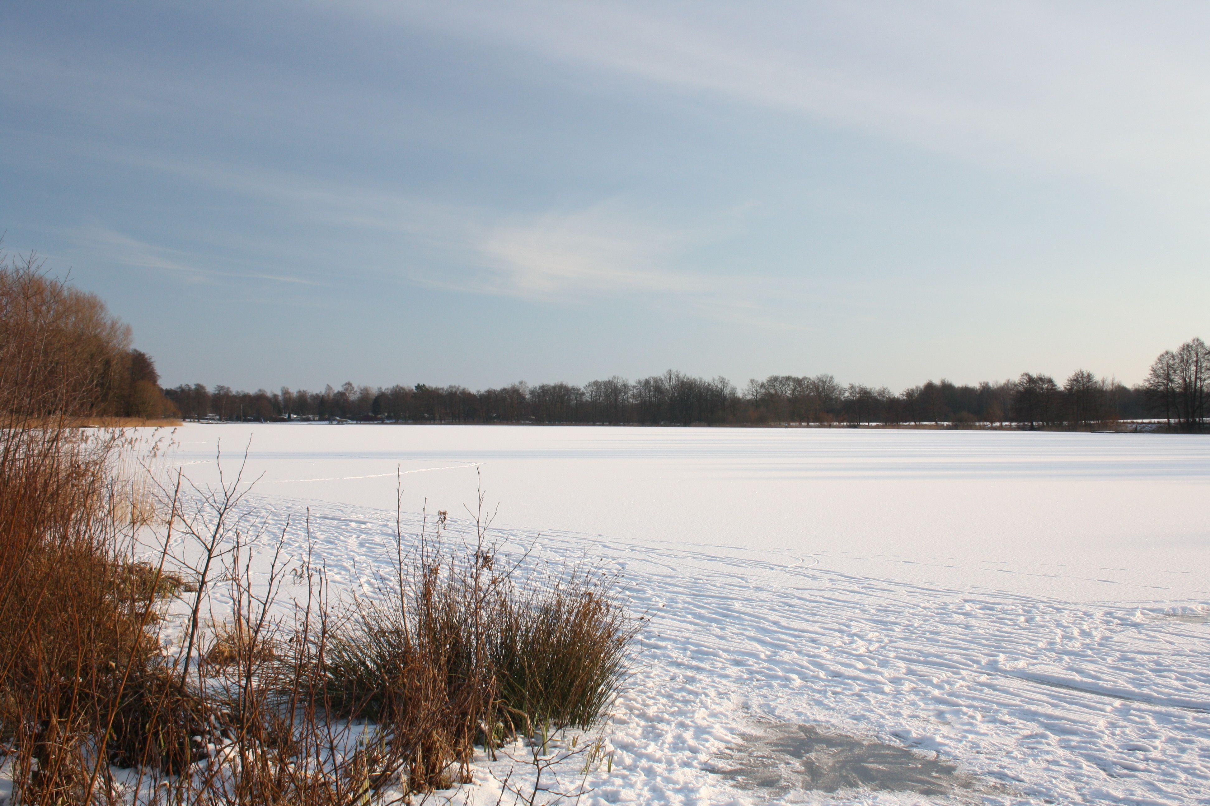 Itzstedter See im Winter, Nordufer